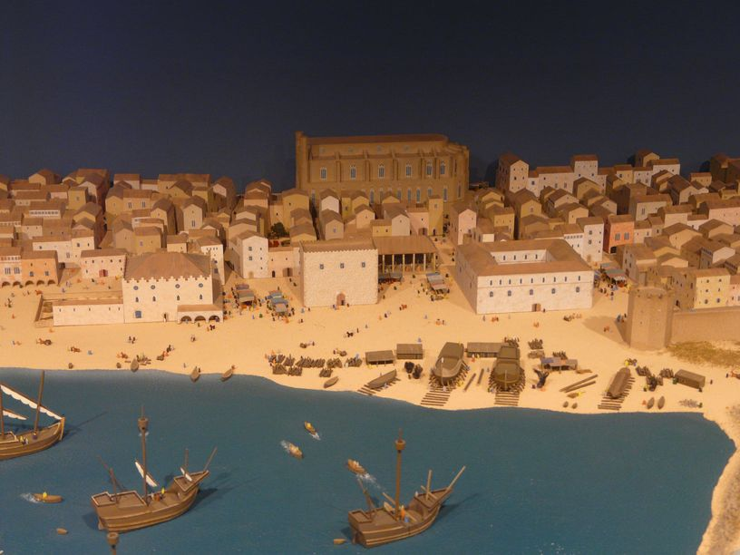 Maqueta litoral de Barcelona al Museu Marítim de Barcelona